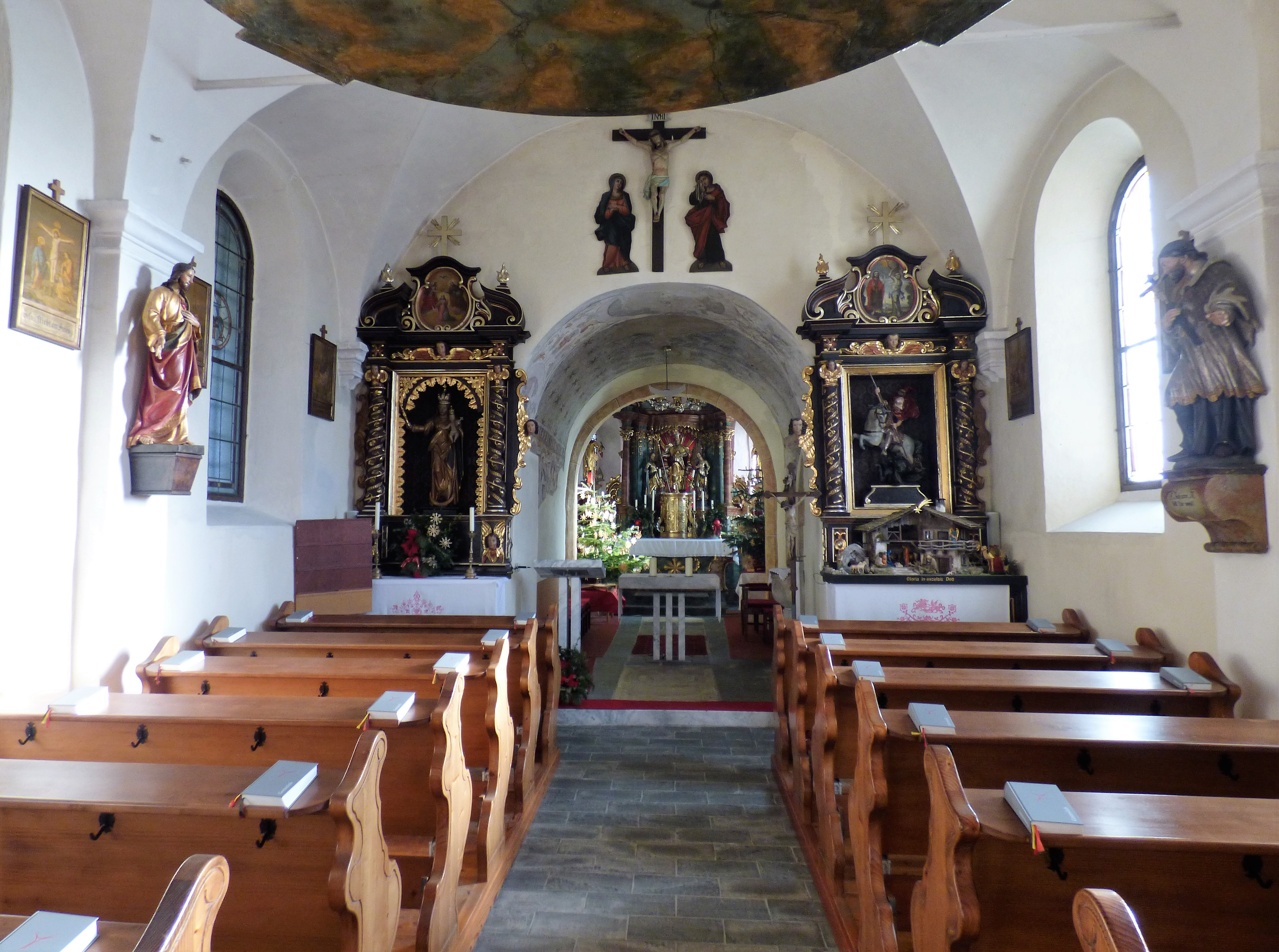 Kirche St. Ulrich (Gemeinde Feldkirchen, Kärnten): Kircheninneres